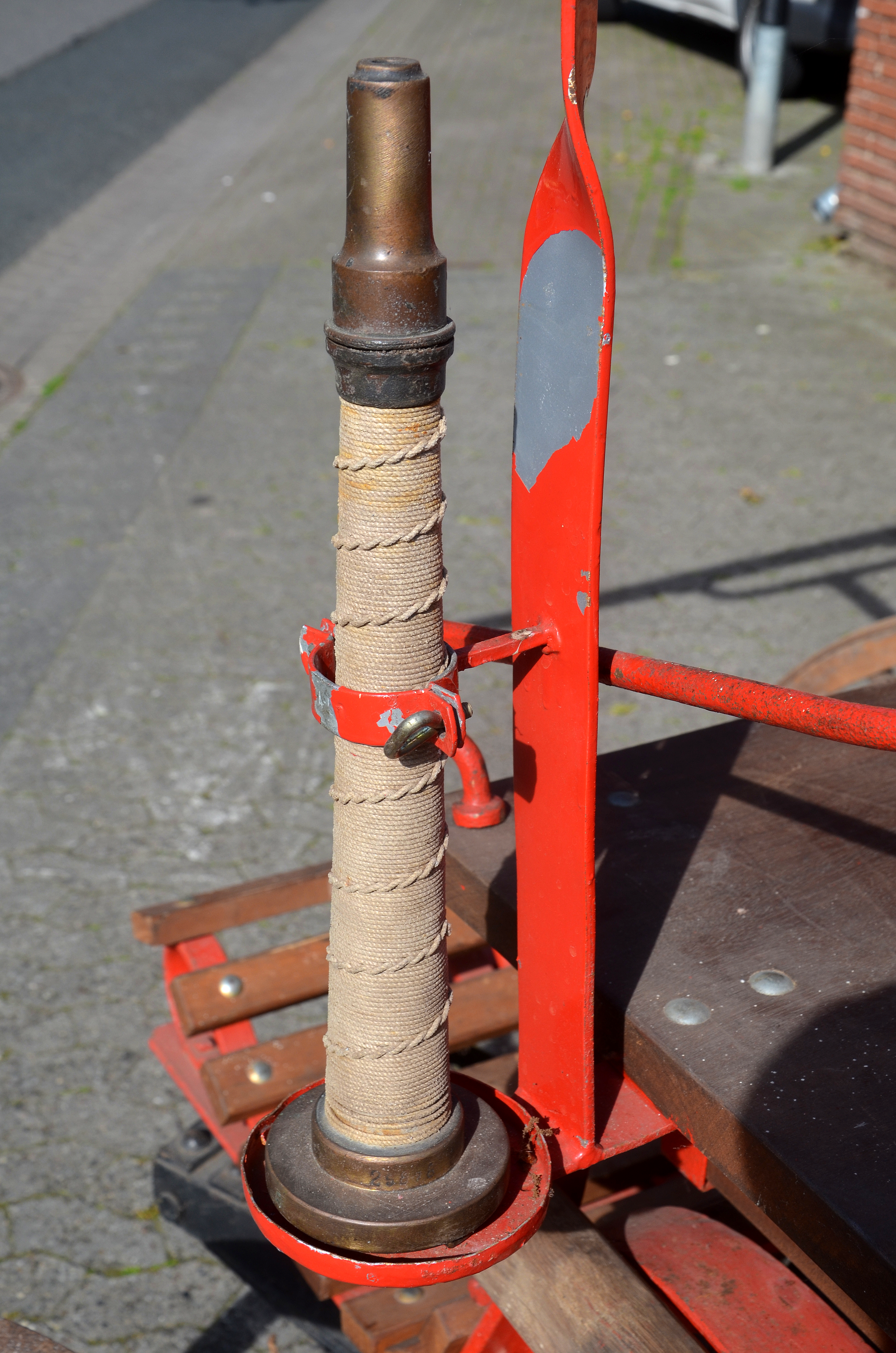 Nach langer Vorbereitung verabredeten sich Mitglieder vom Wikipedia-Büro Hannover am 18. Juli 2017 in Resse (Wedemark) mit Thomas Schmidt, dem stellvertretenden Ortsbrandmeister der Freiwilligen Feuerwehr Resse, für eine kleine Foto-Dokumentation des - denkmalgeschützten - Gerätehauses von 1870 und der historischen, originalen, voll funktionstüchtigen Handdruckspritze der „Spritzen-Fabrik von Chr. Spengler Inh. W. Spengler Hannover“ die laut dem Adreßbuch, Stadt- und Geschäftshandbuch der Königlichen Residenzstadt Hannover und der Stadt Linden beispielsweise von 1894 noch als „Spengler & Lohmann, Feuerspritzenfabrik“ zugleich als Schmiede und Schlosserei unter der - damaligen - Adresse Engelbostelerdamm 21a ihren Sitz hatte ...